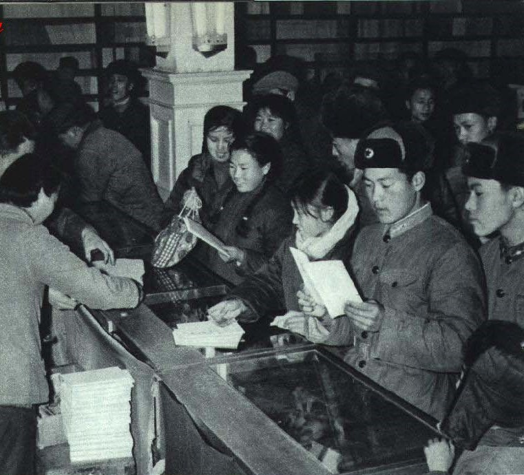 1964-03 1964年 市民购买毛泽东诗词